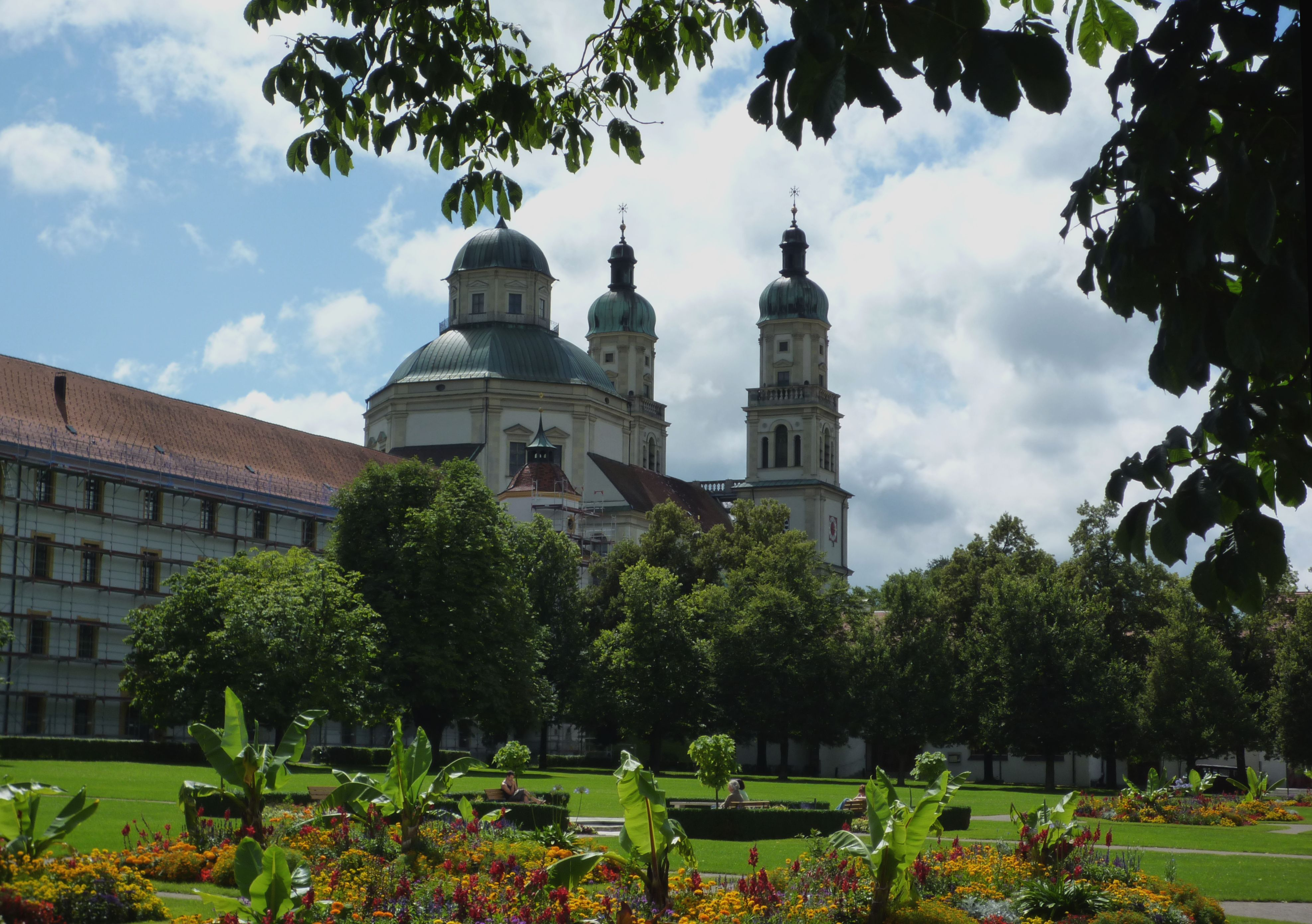 Kempten - Fürstäbtliche Residenz mit Hofgarten, St. Lorenz in Kempten (Allgäu)